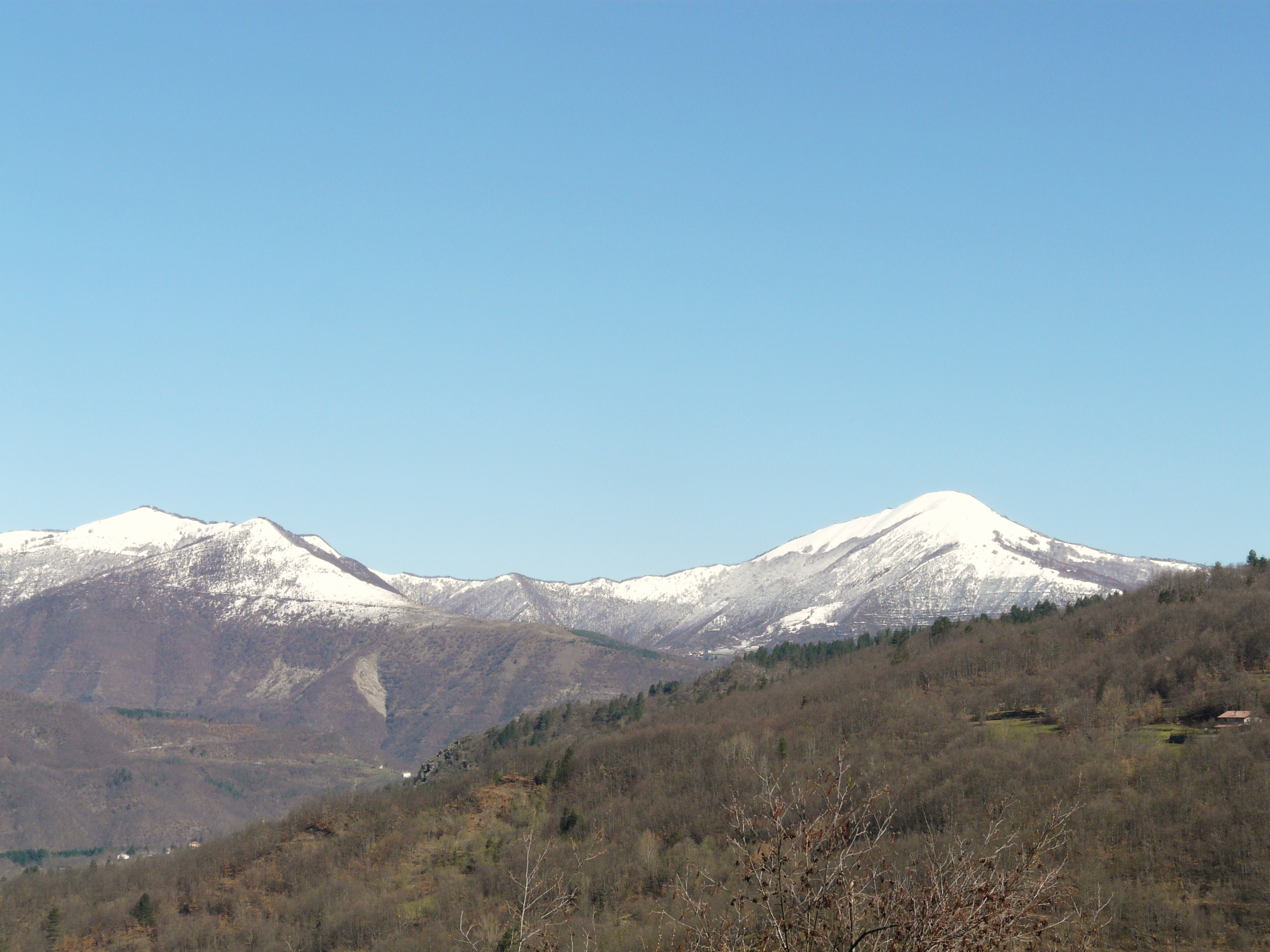 Panorama della val Trebbia da Fontanigorda, Liguria, Italia